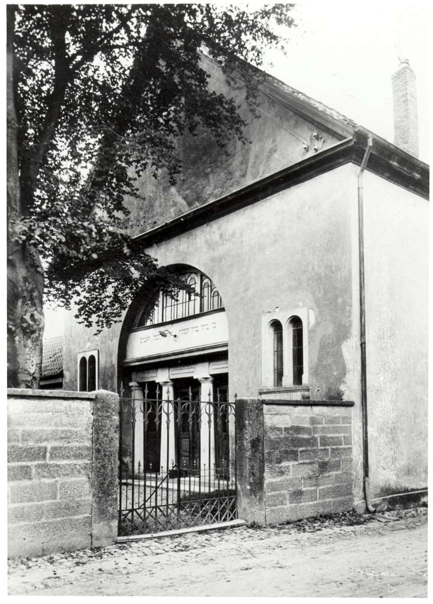 Synagoge (Eichstetten) Nutzungsbedingungen ausdrücklich auch für Wikipedia (siehe: [1]